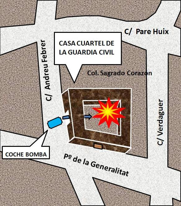 Croquis del atentado contra la casa cuartel de Vic, en Barcelona (España), el 29 de mayo de 1991.